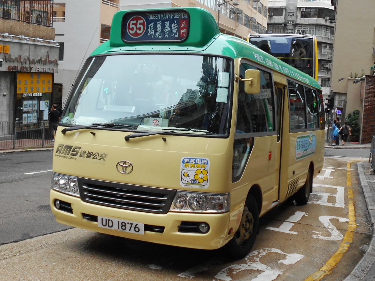 中文（香港）: 港島專線小巴55線，駛經李陞小學前往瑪麗醫院